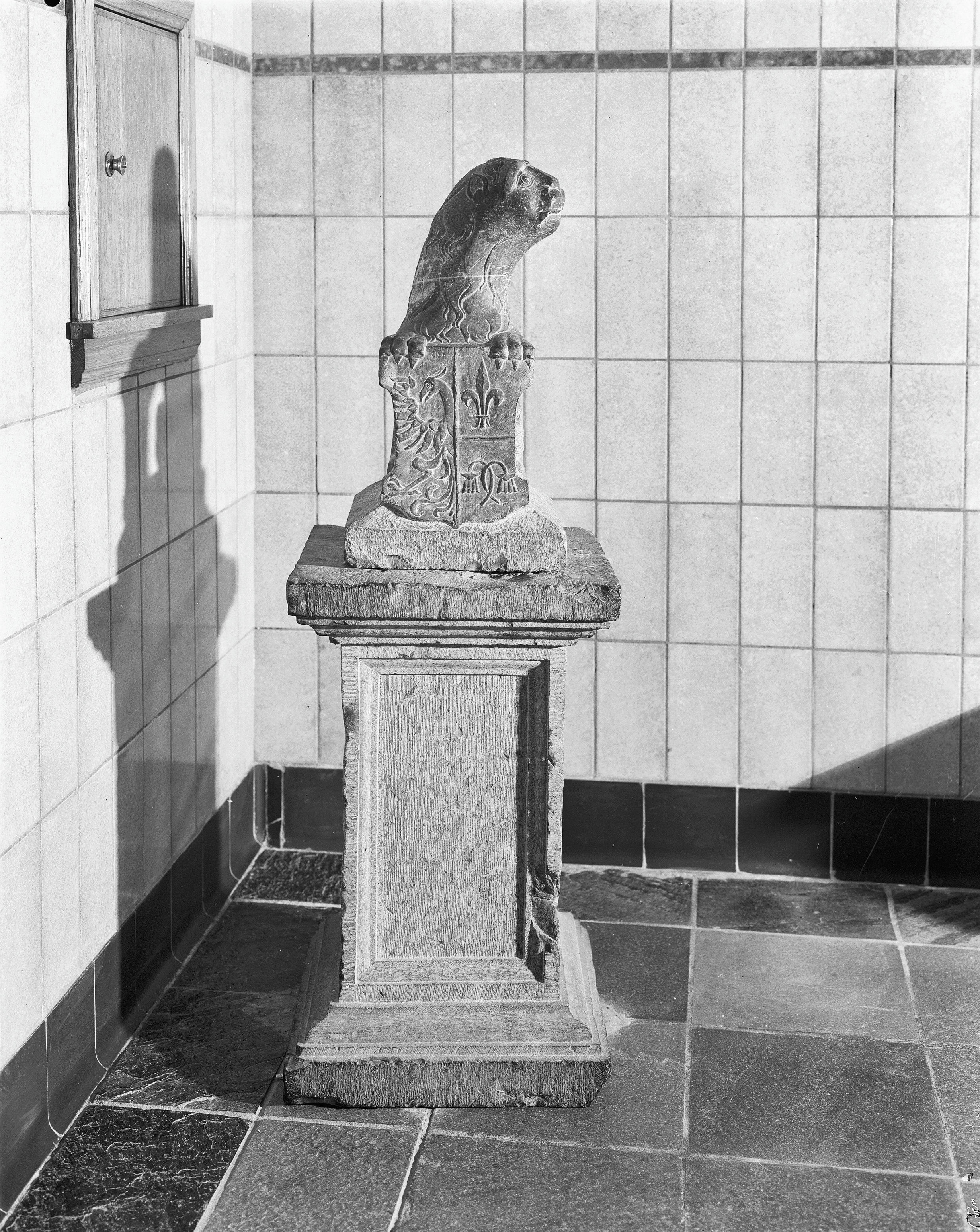 Gemeentehuis: pilaster en kapiteel van slotpoort Ropta